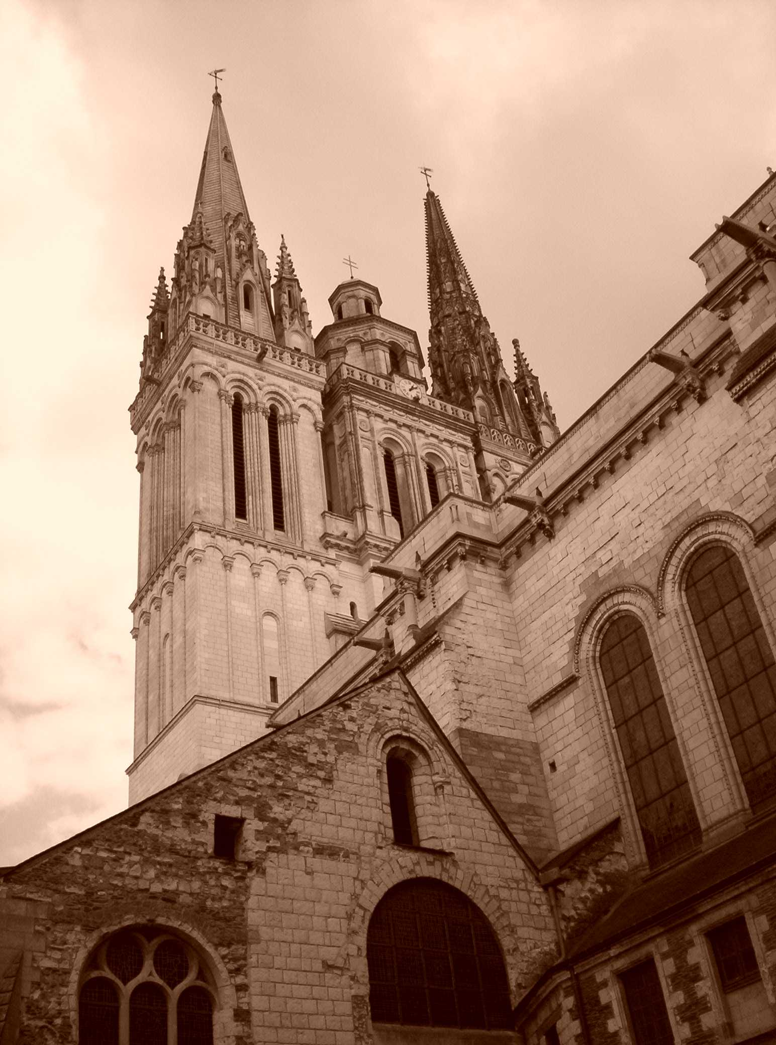 Cathédrale Saint Maurice à Angers - Vue arrière .